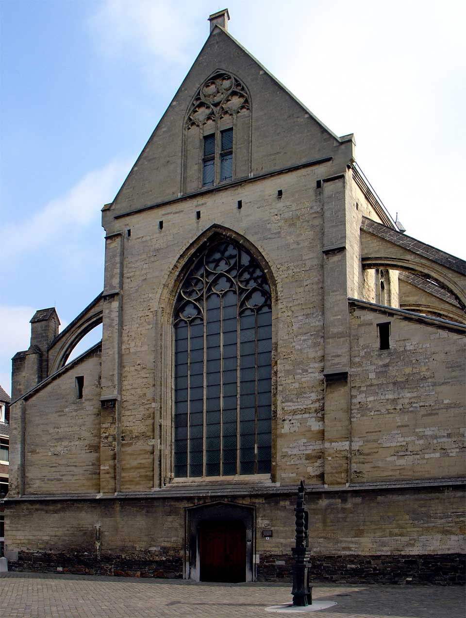 Franciscanerkerk in Maastricht